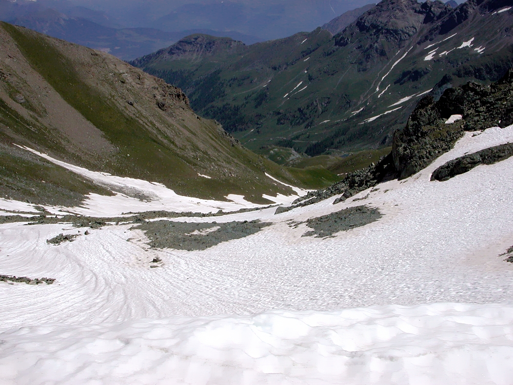 Colle di Saint Marcel - Alpi Graie - Italy